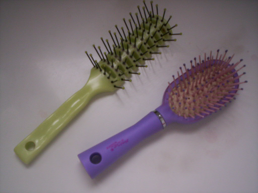 Brosses à cheveux